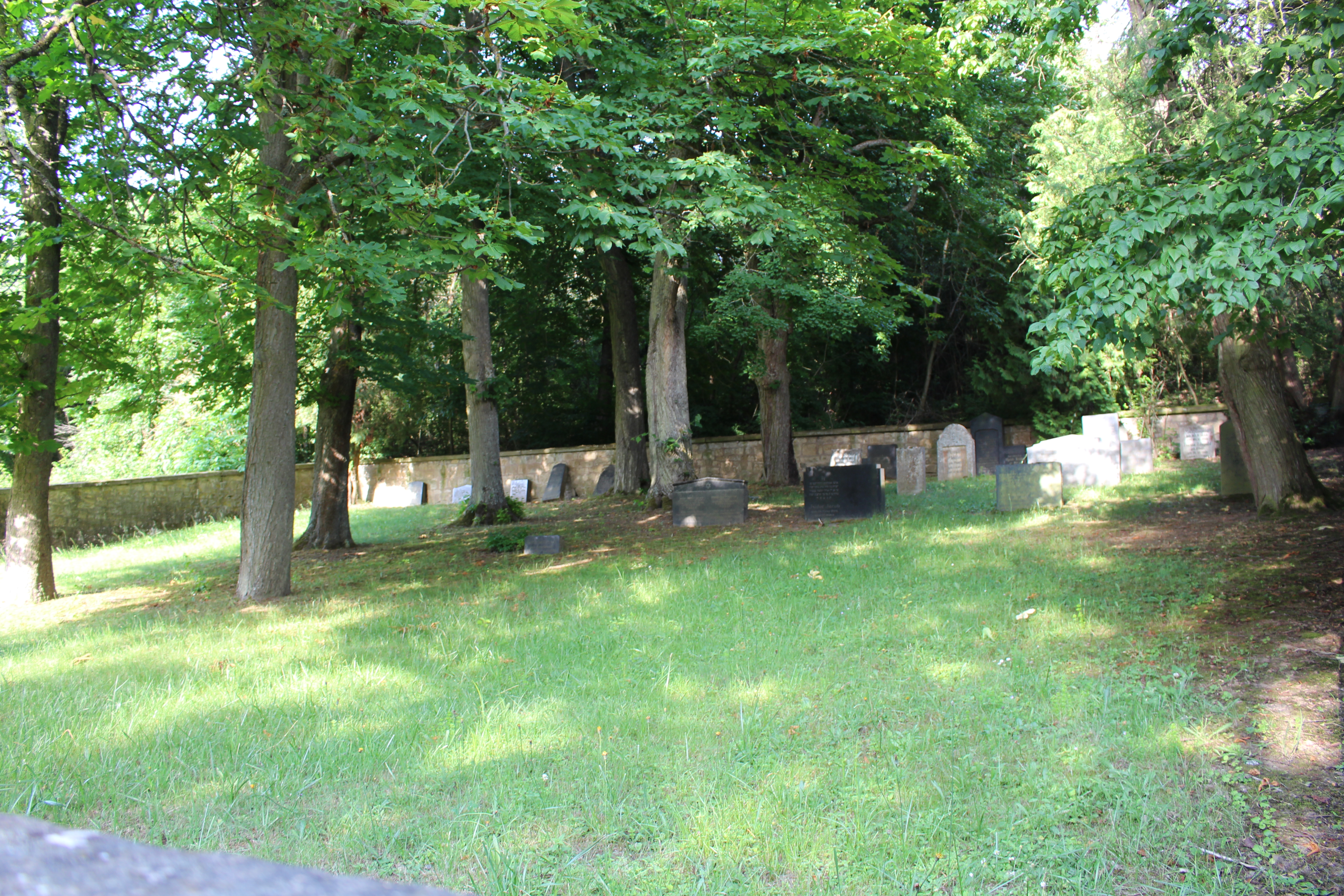 1912 angelegt, bis 1939 belegt, circa 25 Grabsteine